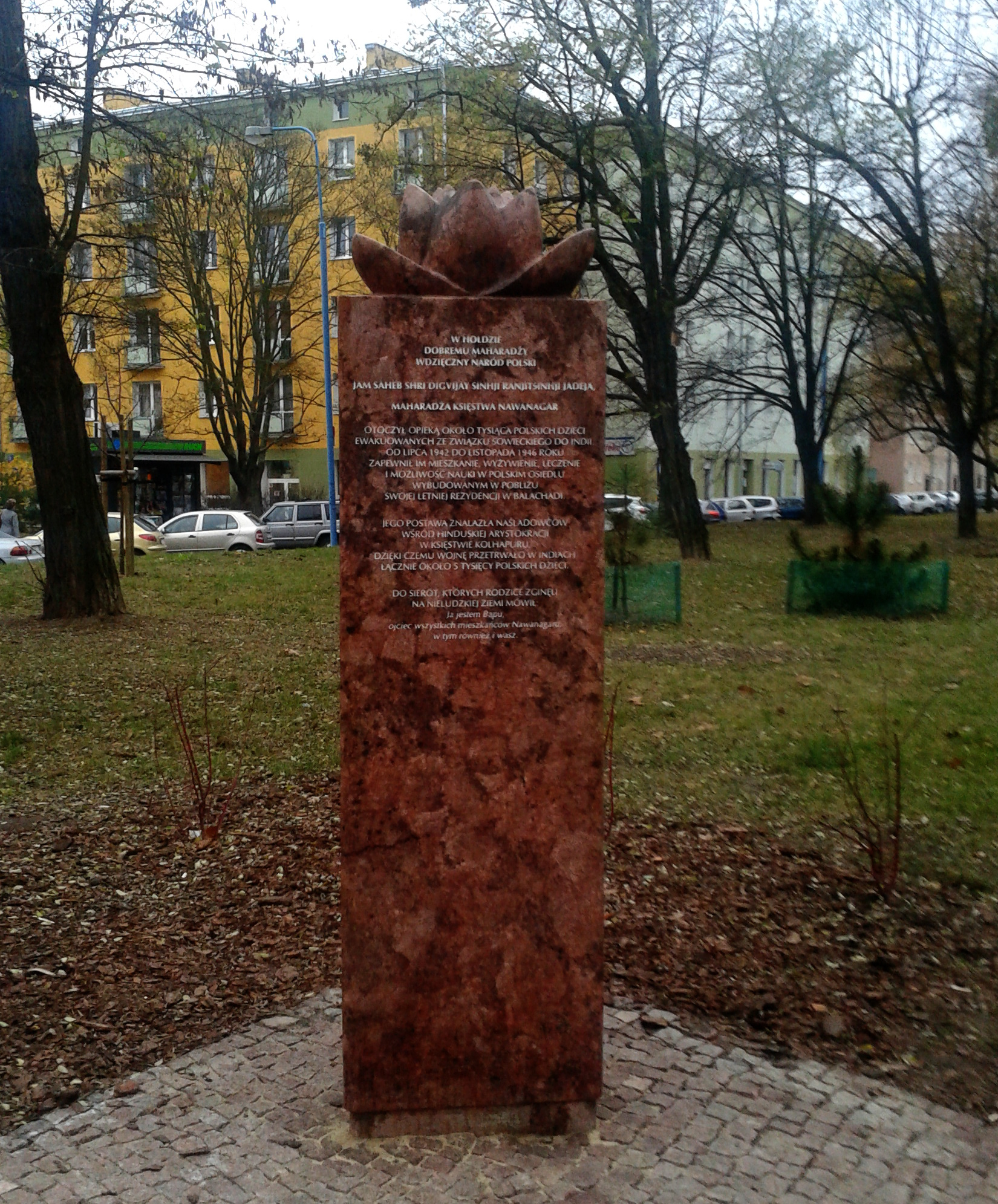 Pomnik Dobrego Maharadży Digvijaysinhji Ranjitsinhji w Warszawie na skwerze jego imienia – róg Opaczewskiej i Białobrzeskiej